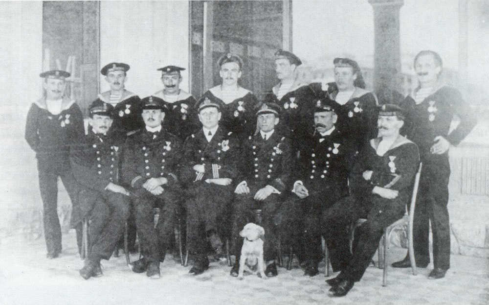 Besatzung von K.u.K. U-12 Ordensverleihung nach der Torpedierung des französischen Schlachtschiffes Jean Bart